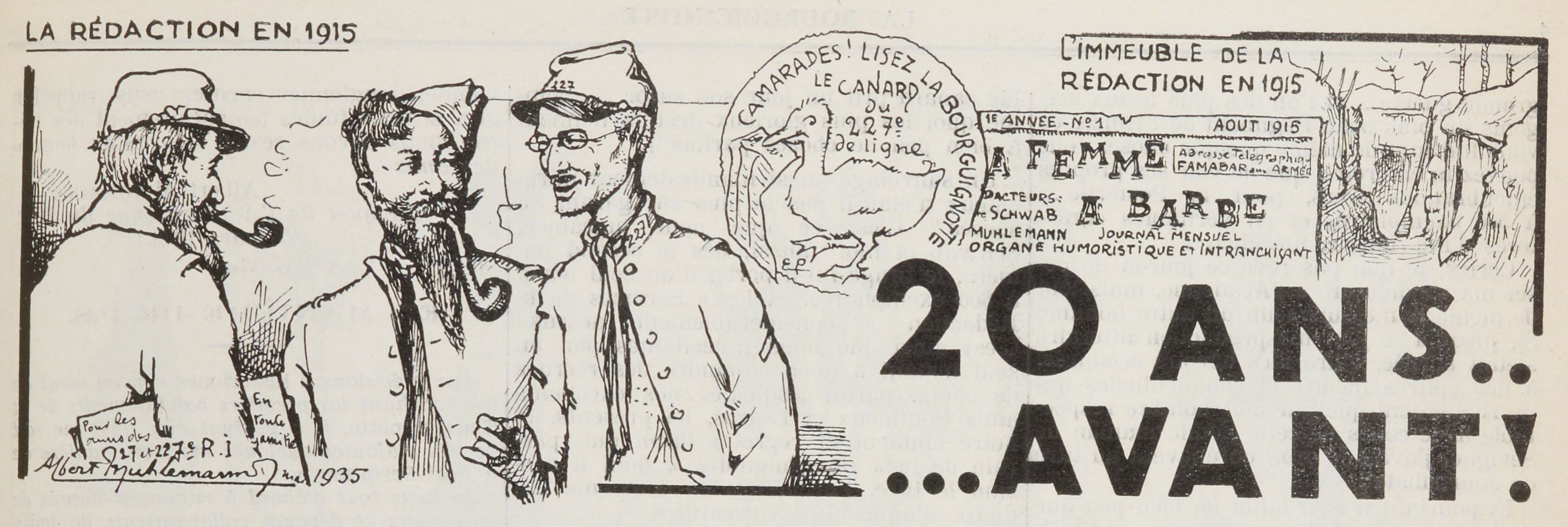 Caricature paru du numéro anniversaire des 20 ans de la Bourguignotte, journal du 227e RI dont la parution a débuté dans les tranchées en 1915. À gauche, les trois fondateurs : Albert Mulhemann, Eugène Piron et André Schwab.